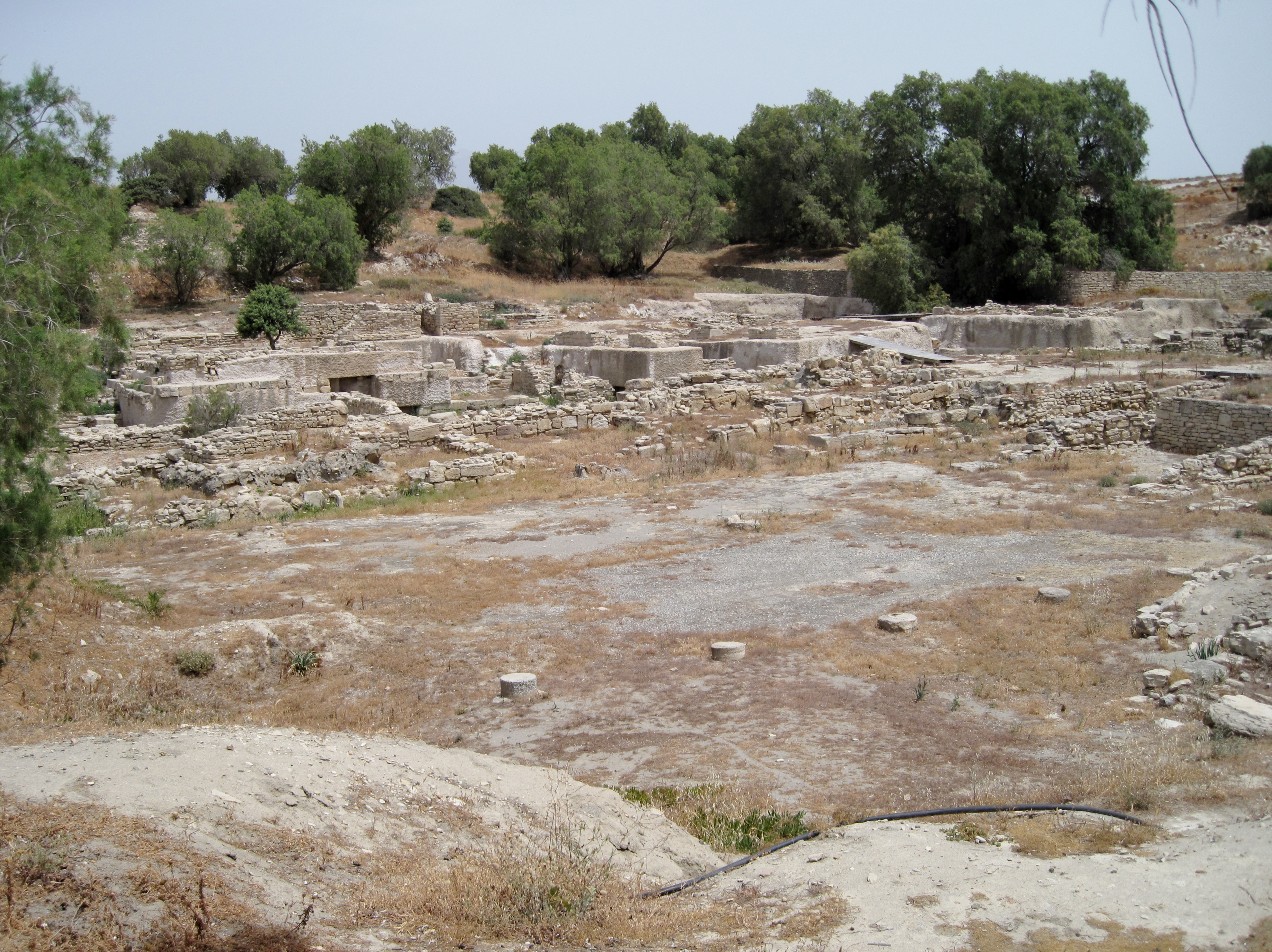 Ausgrabungsstätte der antiken Küstensiedlung Komos (auch Kommos), Gemeinde Tymbaki, Präfektur Iraklio, Kreta, Griechenland